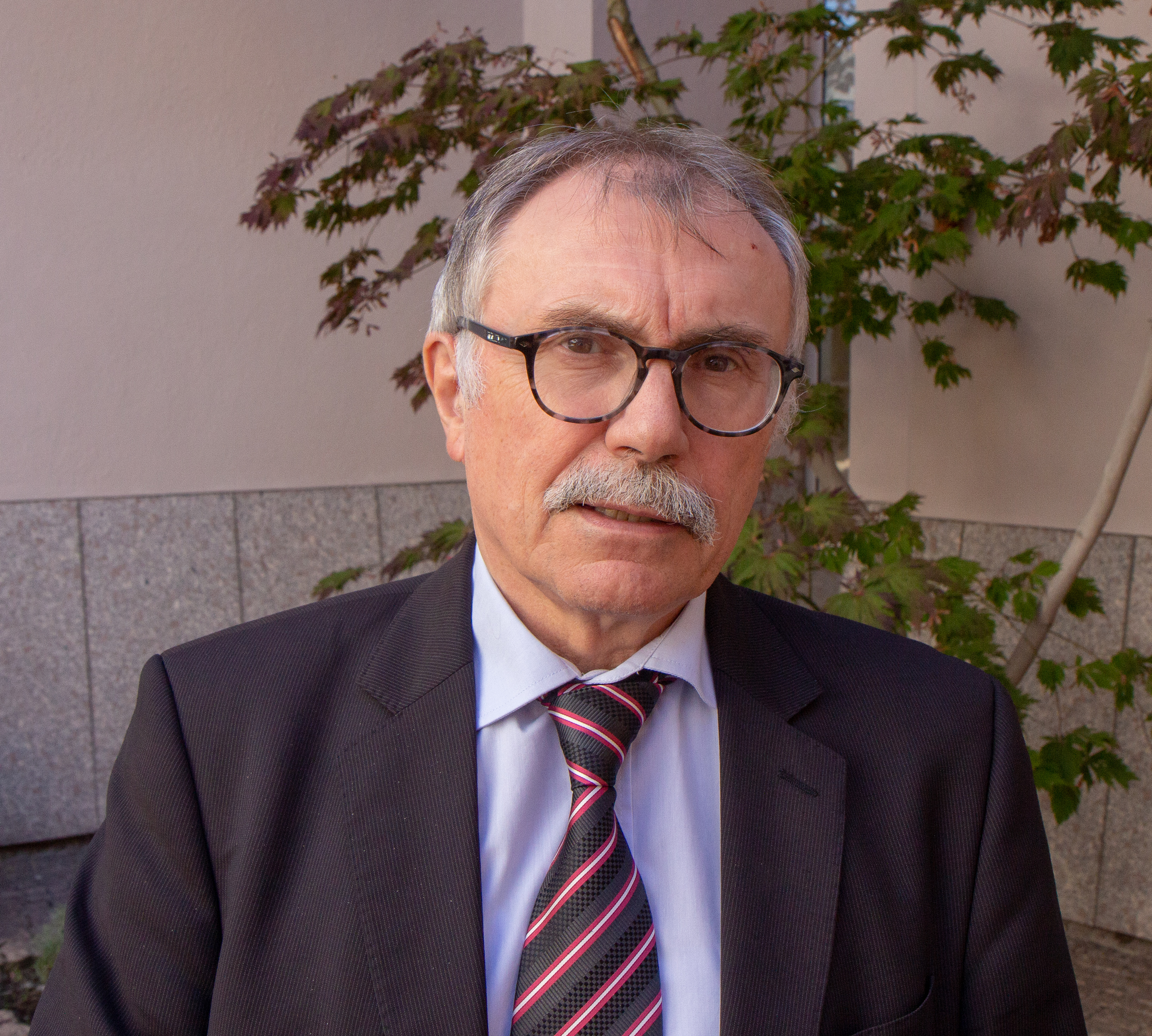 Vorstellung des Buches "Ohne Familie ist kein Staat zu machen" im Erbacher Hof in Mainz u.a. mit Paul Kirchhof, Sylvia Pantel, Christian Baldauf, Bischof Peter Kohlgraf, Prof. Jürgen Borchert, Mechthild Loehr und Karl-Heinz van Lier.